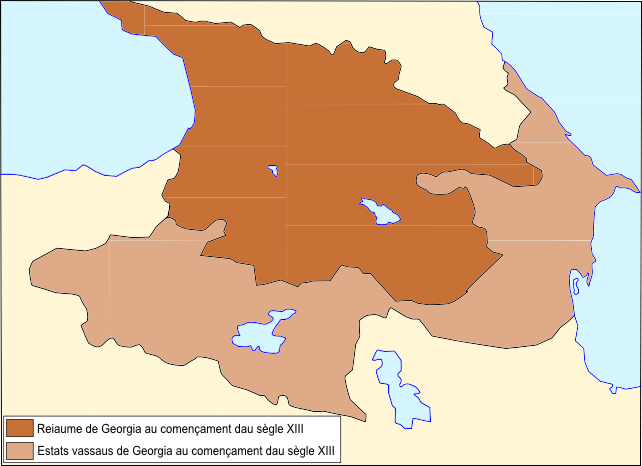 Reiaume de Georgia a son apogèu au començament dau sègle XIII.